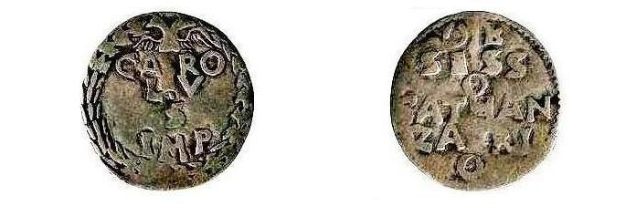 Carlo V, carlino (s.d. post 1528) Entro corona d'alloro, su quattro righe: CARO // LV // S // IMP. In altro parte di aquila bicipite Su sei righe, OB/SESS/O/CATHAN/ZARI/O.